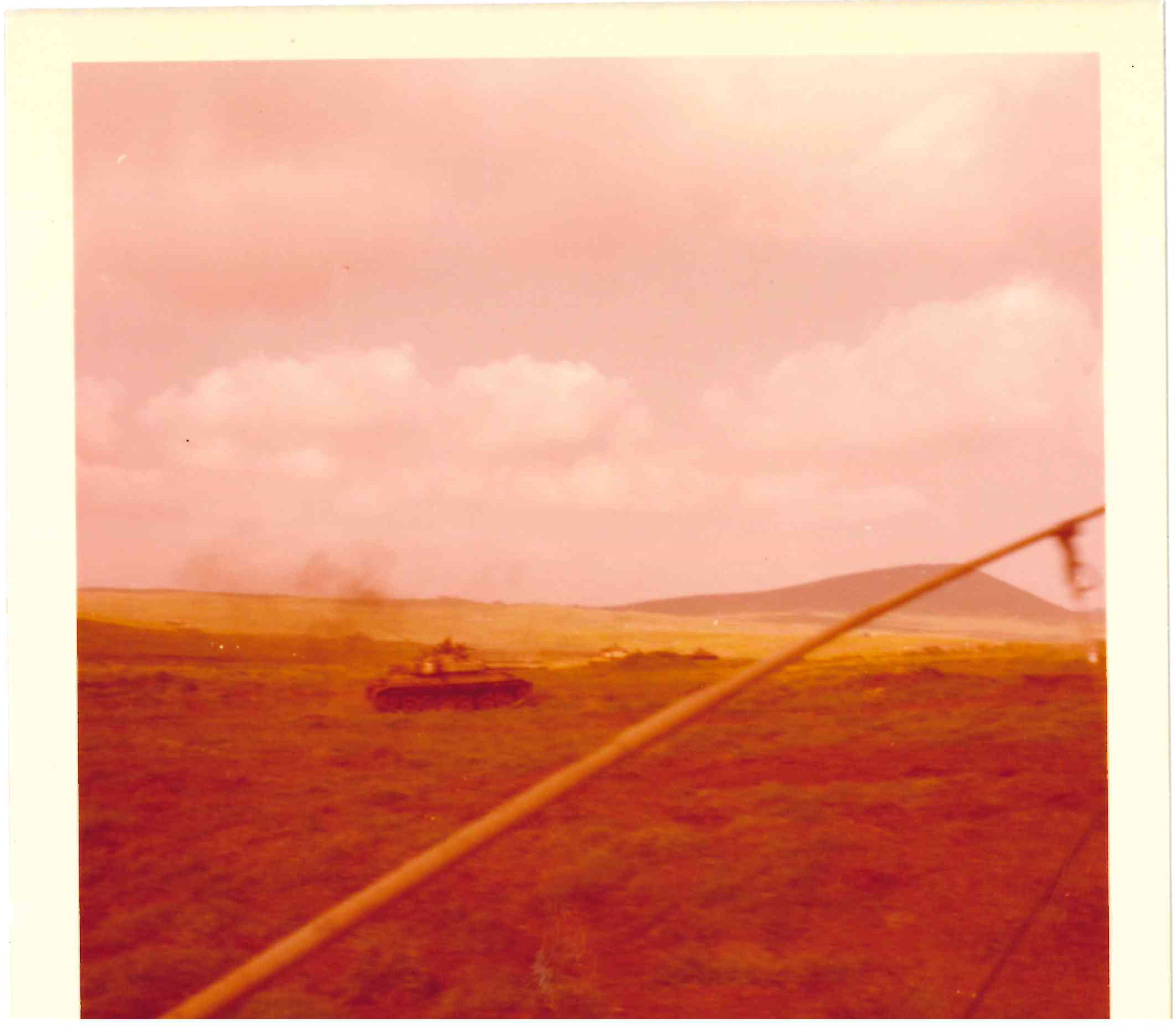 טנקי כוח נתי ברמת הגולן במלחמת יום הכיפורים